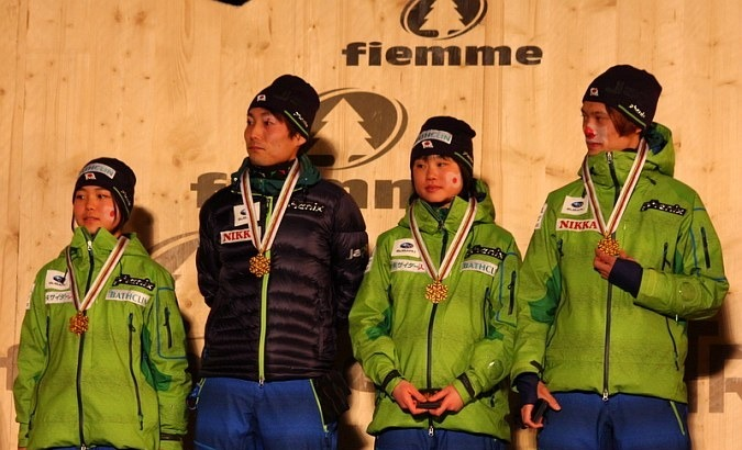 Sara Takanashi, Daiki Ito, Yuki Ito, Taku Takeuchi podczas dekoracji medalistów konkursu drużyn mieszanych na skoczni normalnej (Mistrzostwa Świata 2013, Val di Fiemme).